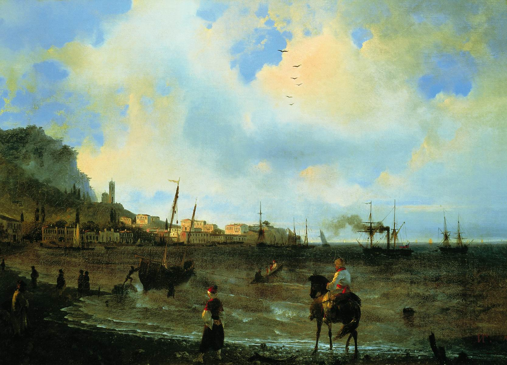 Ялта.1838 Холст, масло. 47x66 см. Феодосийская картинная галерея им И.К.Айвазовского, Феодосия